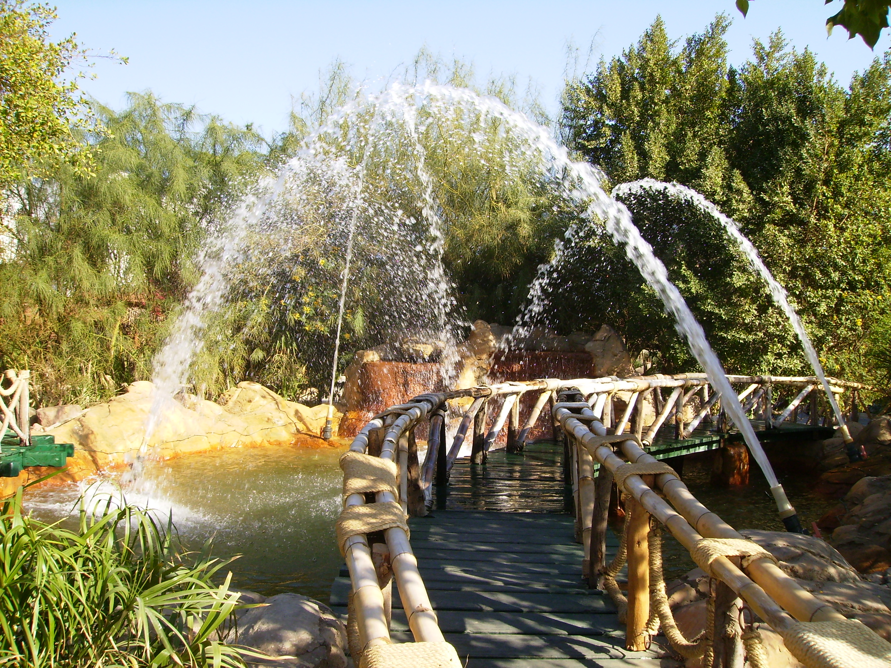 Фонтан при входе в главные ворота - Дельта-Шарм (Шарм-эль-Шейх, Египет)